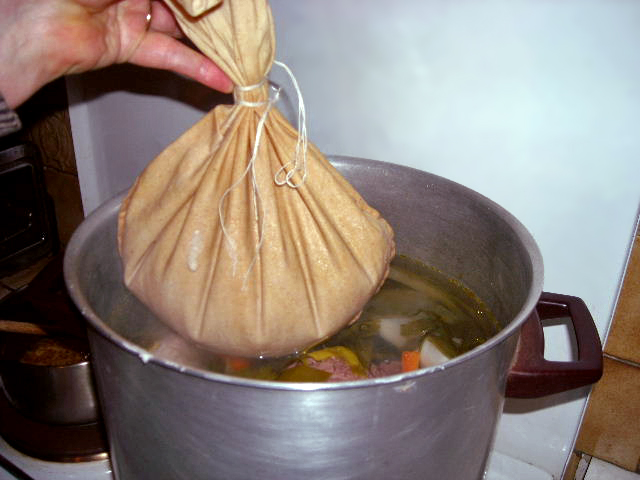 Plat traditionnel de Basse-Bretagne : Kig-Ha-Farz